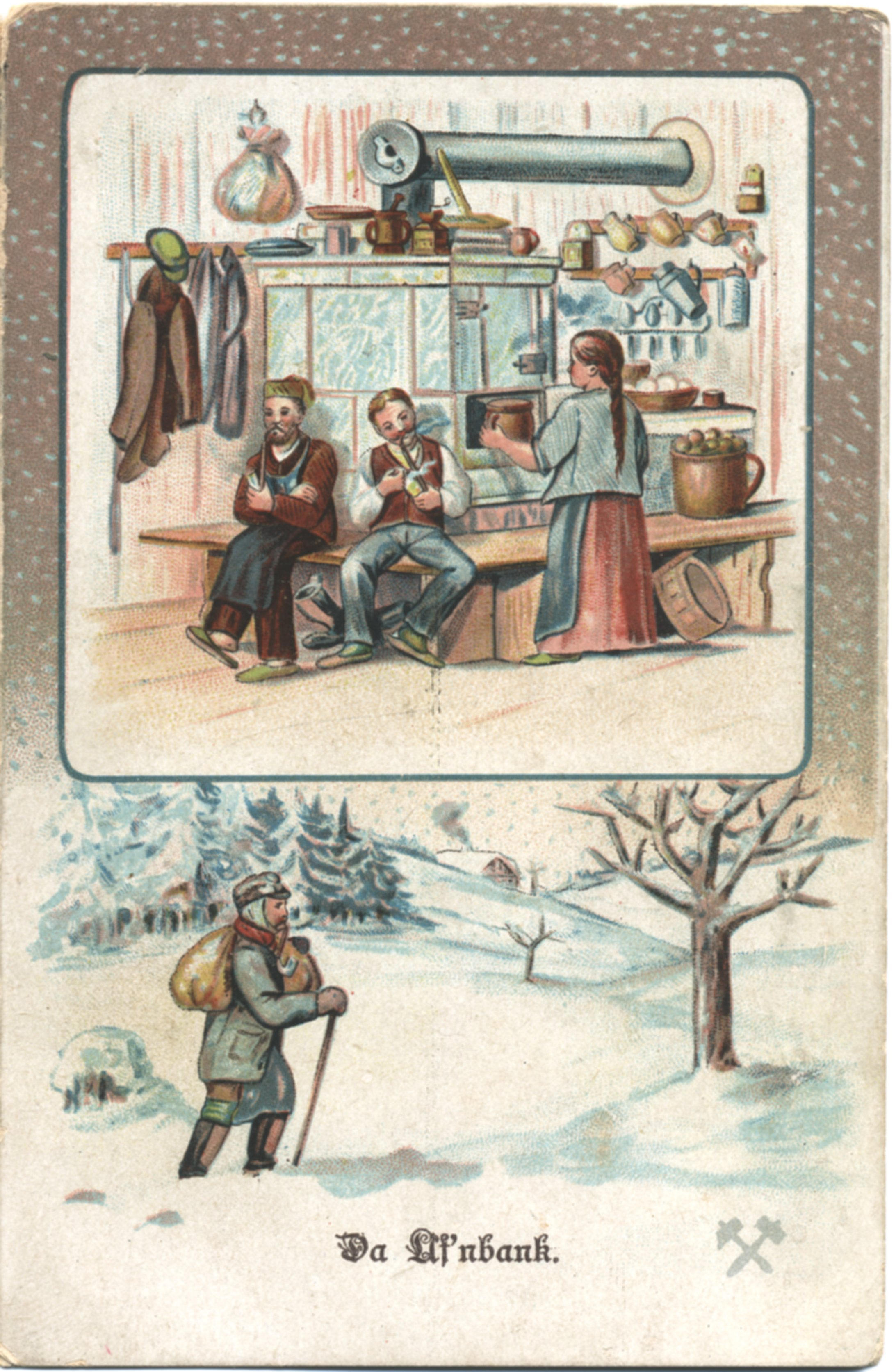 Liedpostkarte von Anton Günther Nr. 9 "Da Uf'nbank" Vorderseite